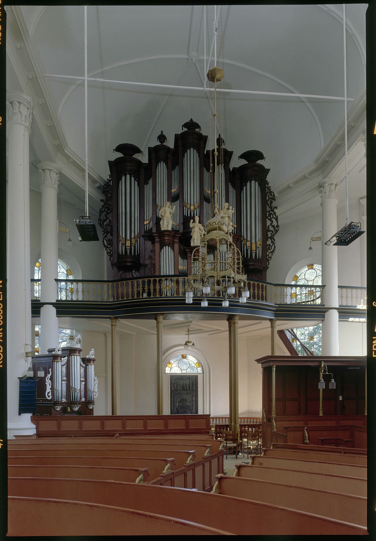 Nederlands Hervormde Kerk: Interieur, aanzicht orgel, orgelnummer 454 (opmerking: Gefotografeerd voor Het Historische Orgel in Nederland 1819-1840, bladzijde 229)